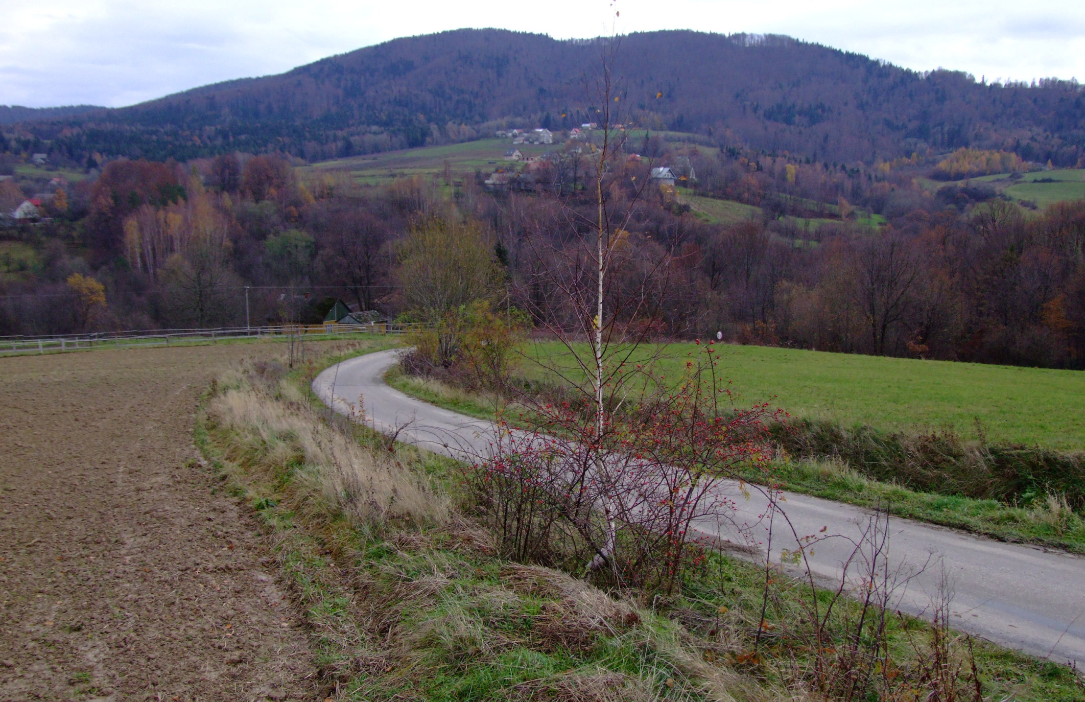 Pasierbiecka Góra - widok od zachodniej strony